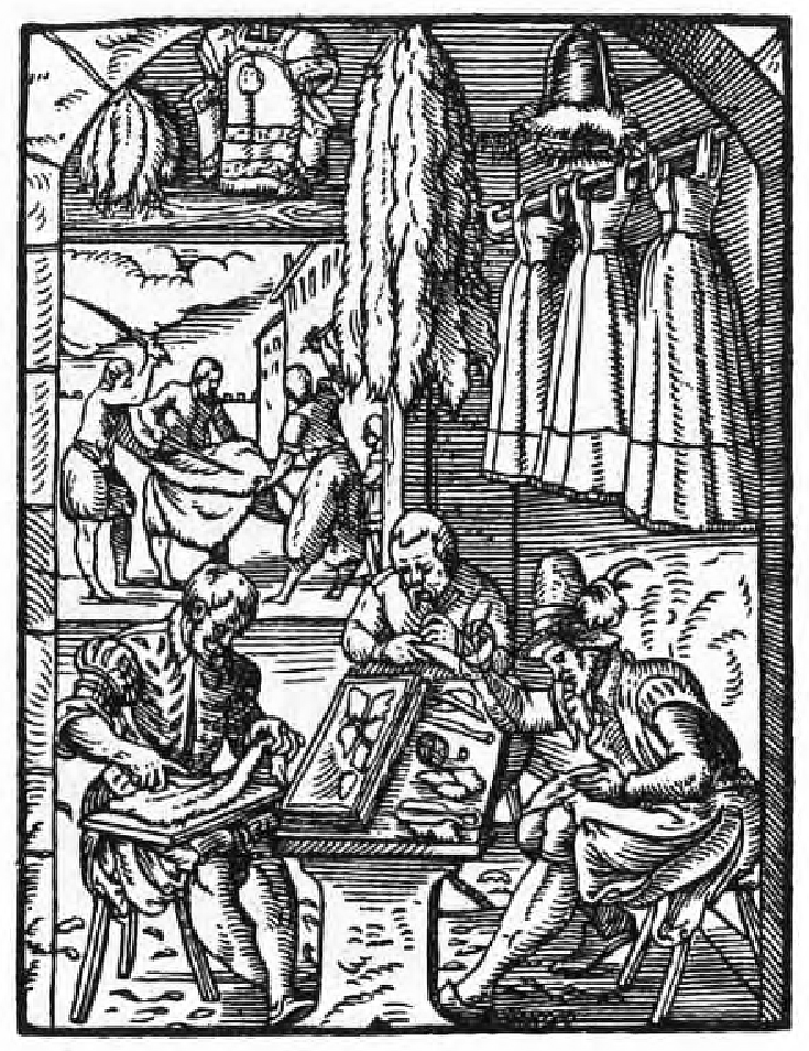 "Der Kürschner" aus Eigentliche Beschreibung aller Stände auf Erden (1568)